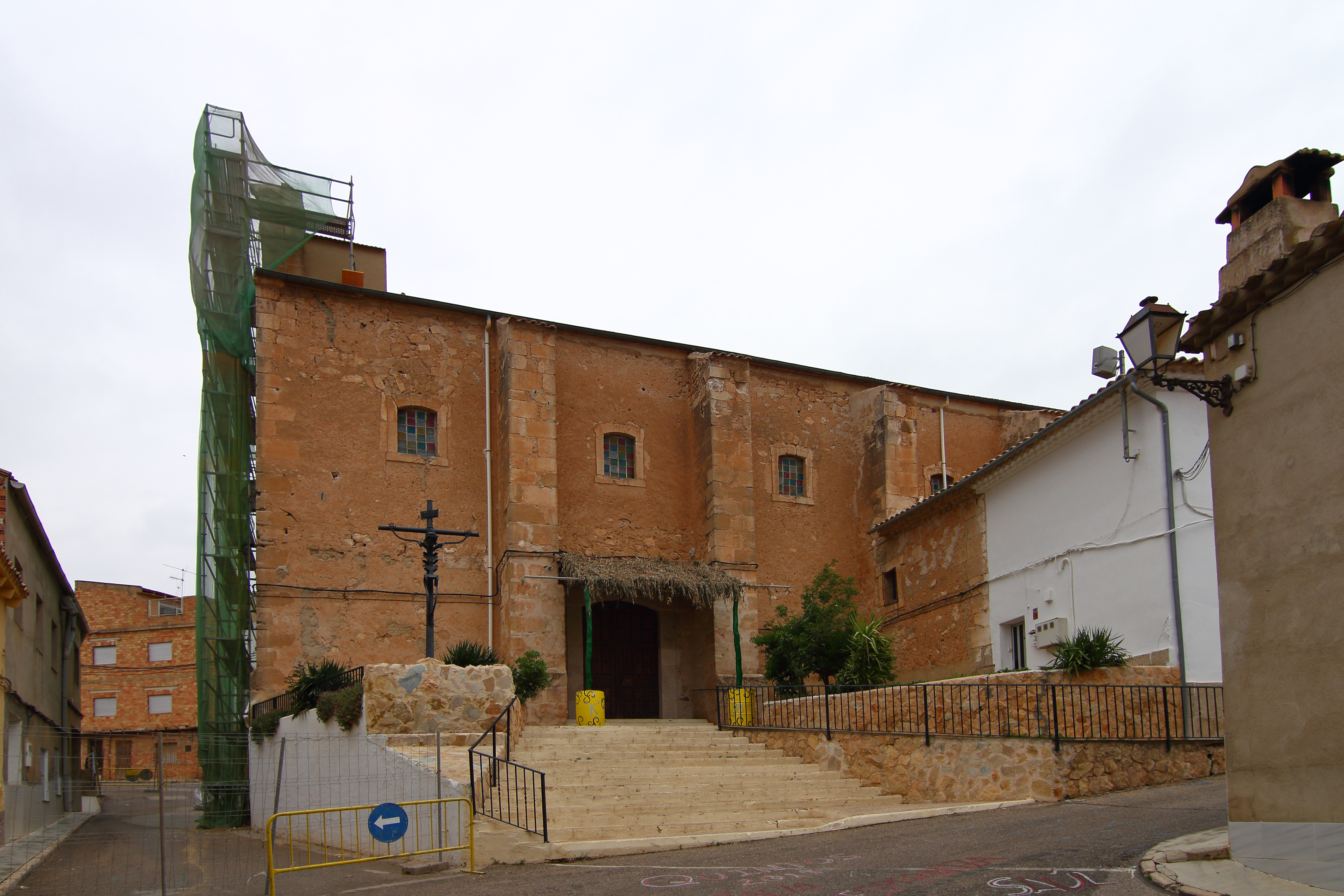 Villalpardo, Iglesia parroquial de San Pedro Advíncula, 01